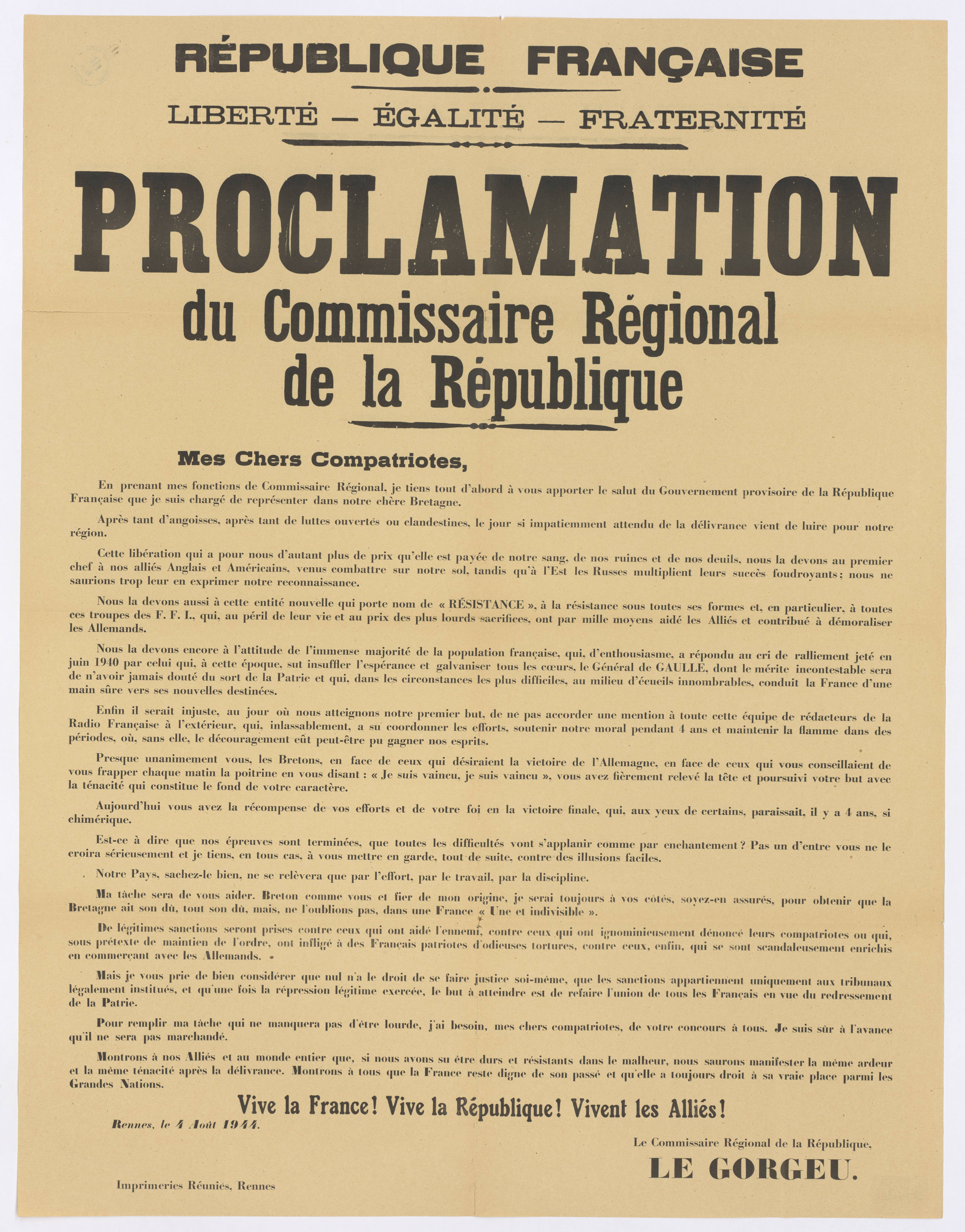 Texte prononcé par Victor Pierre Le Gorgeu, commissaire régional de la République en Bretagne, le 4 août 1944, jour de la Libération de Rennes. Affiche éditée par les Imprimeries réunies, Rennes. Archives municipales de Rennes, 9Fi4.